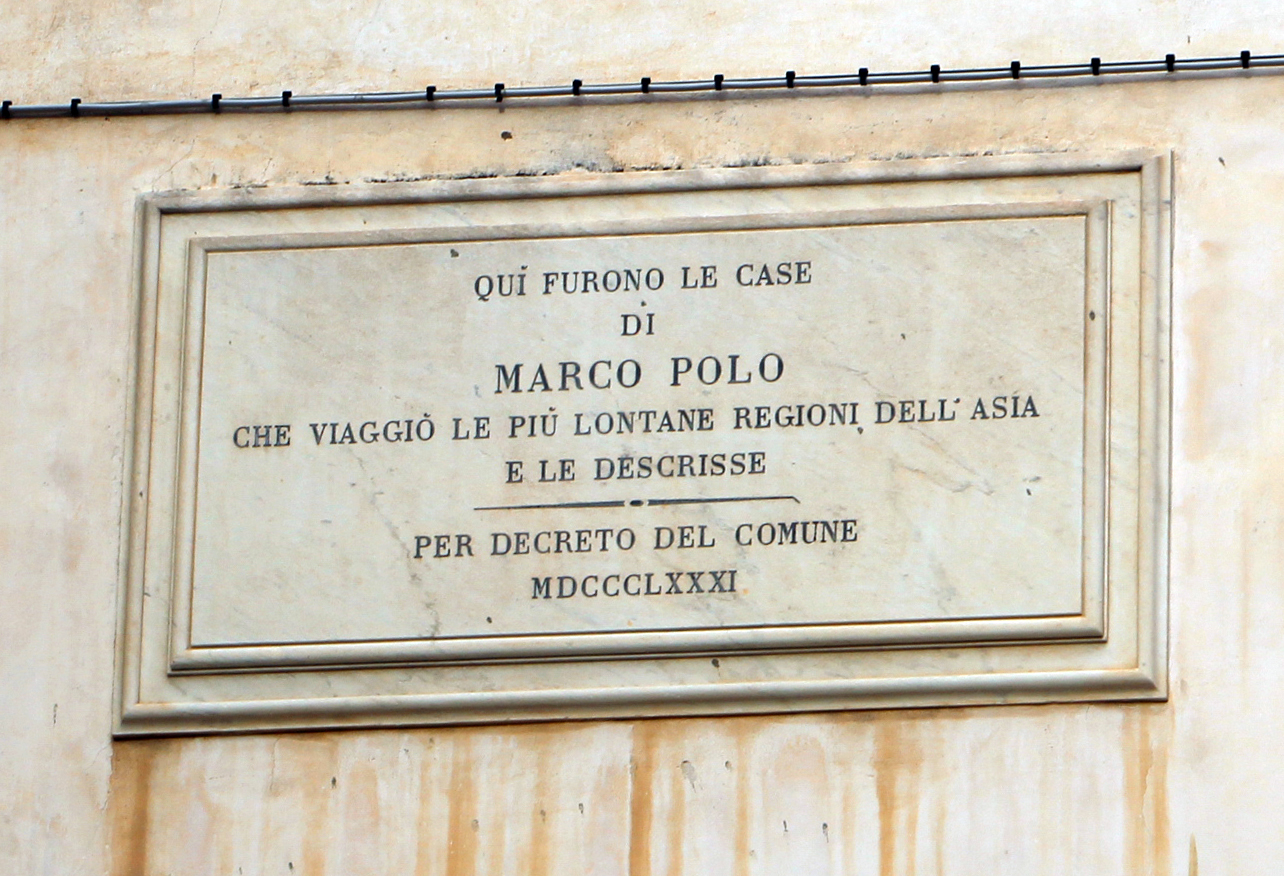 Venezia, canali e miscellanea